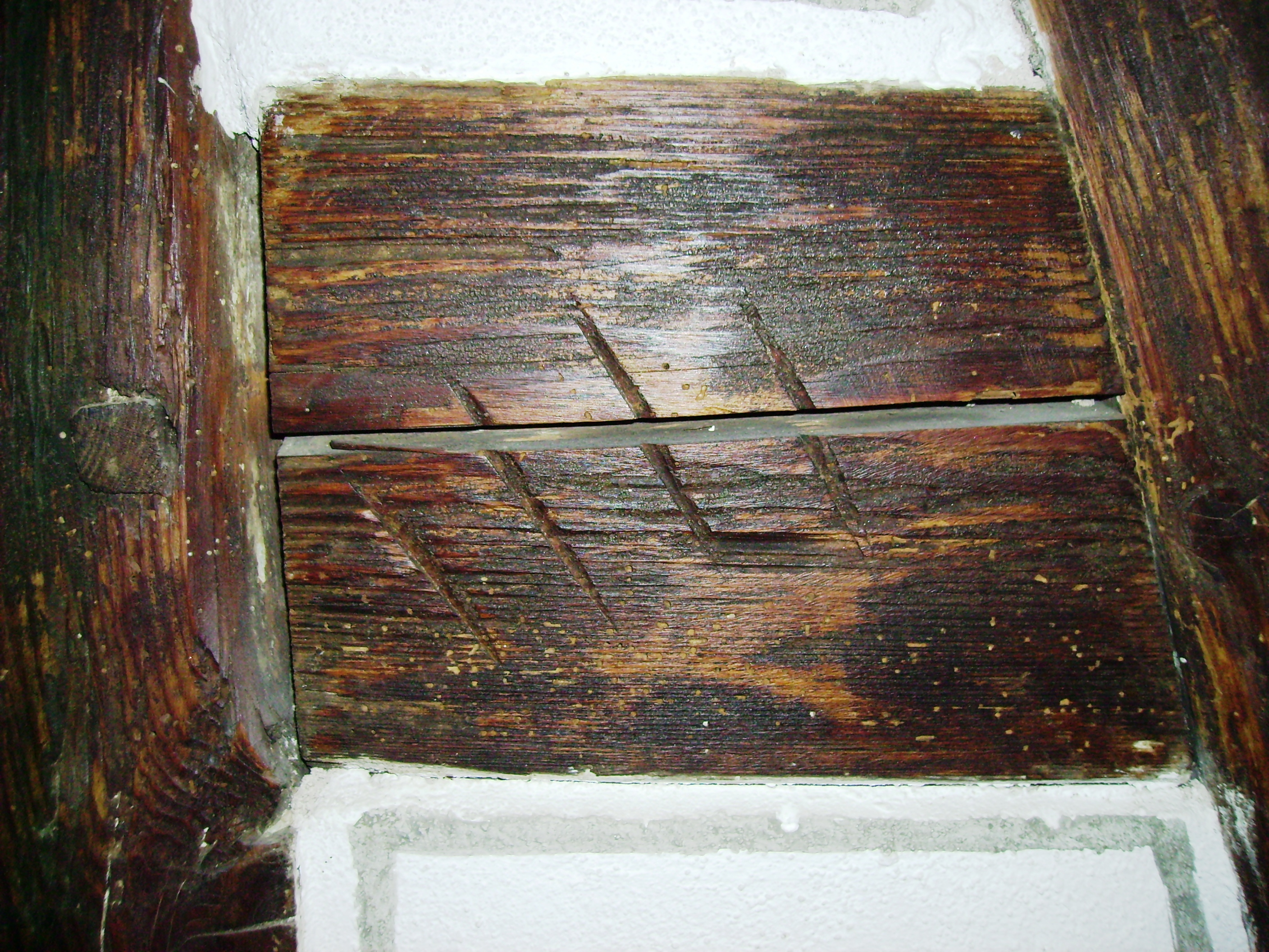 Abbundzeichen (Haus Feuchtwangen, Baujahr 1554)